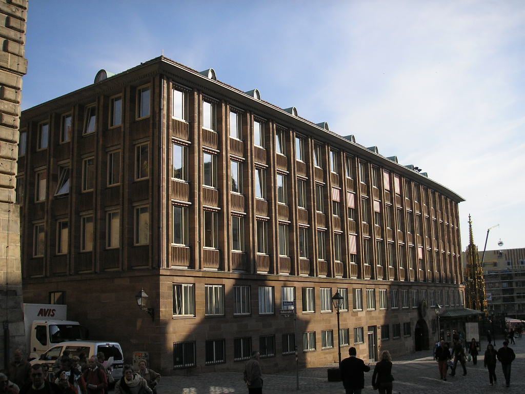 Neues Rathaus Nürnberg / new city hall, Nuremberg, Germany